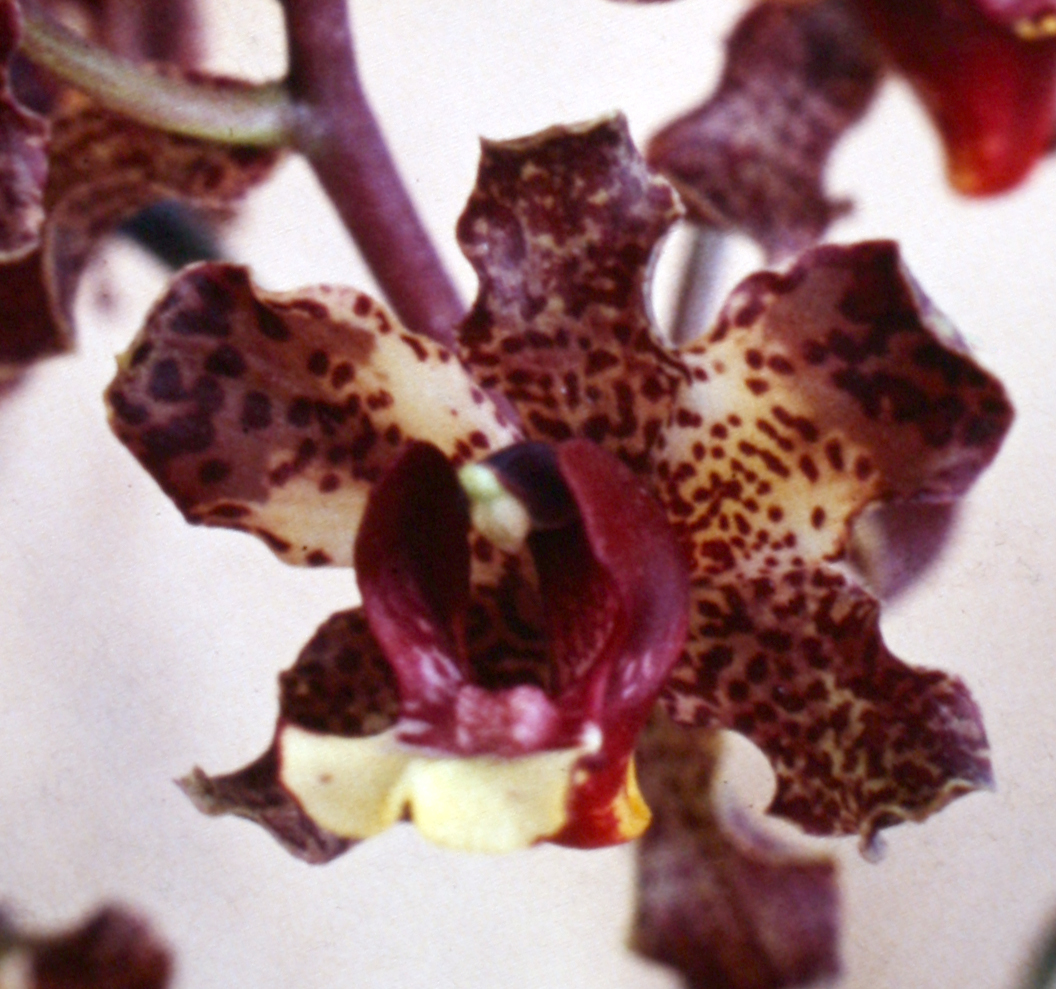 Cyrtopodium parviflorum, Suriname.